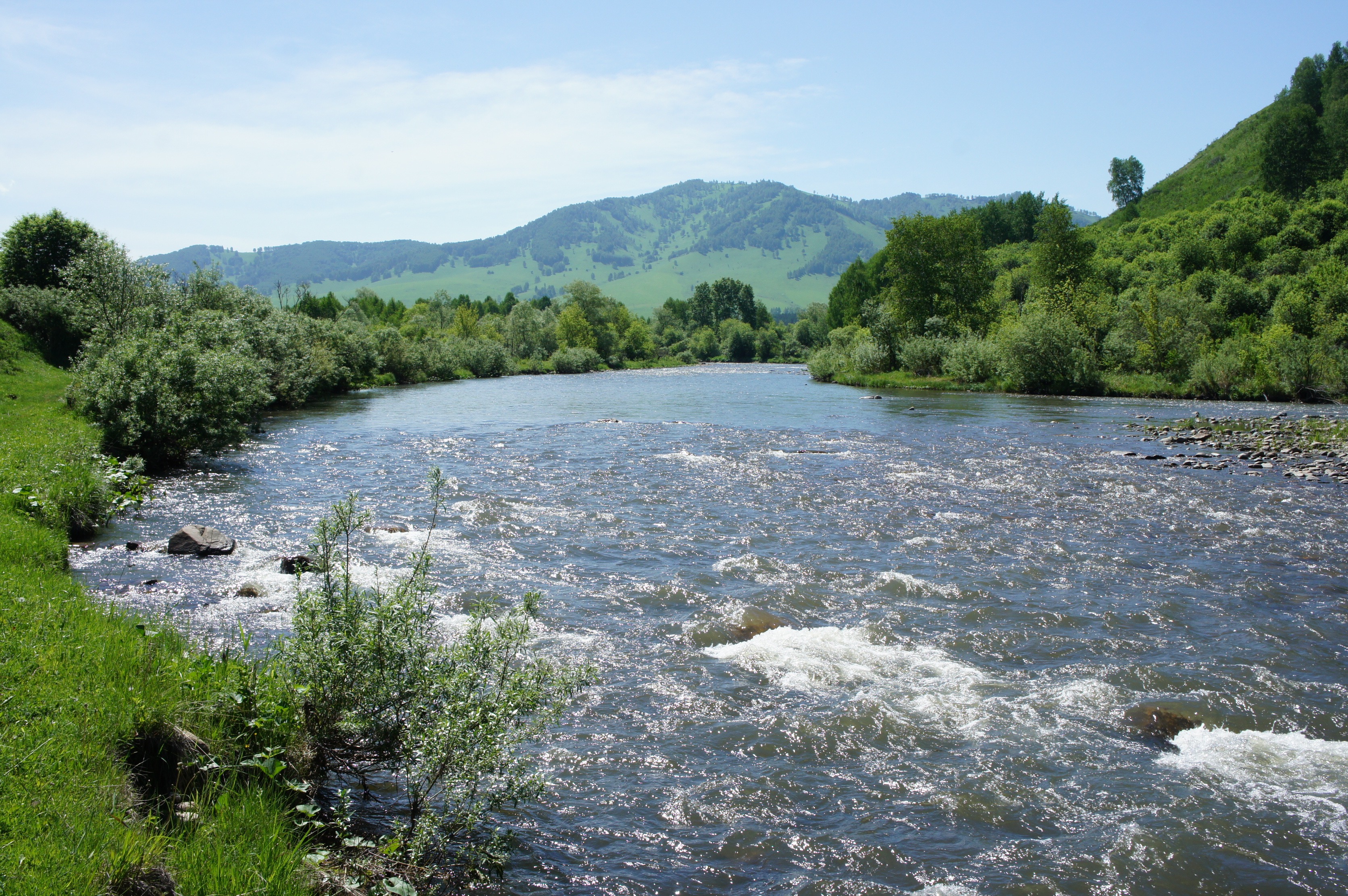 река Ануй в июне